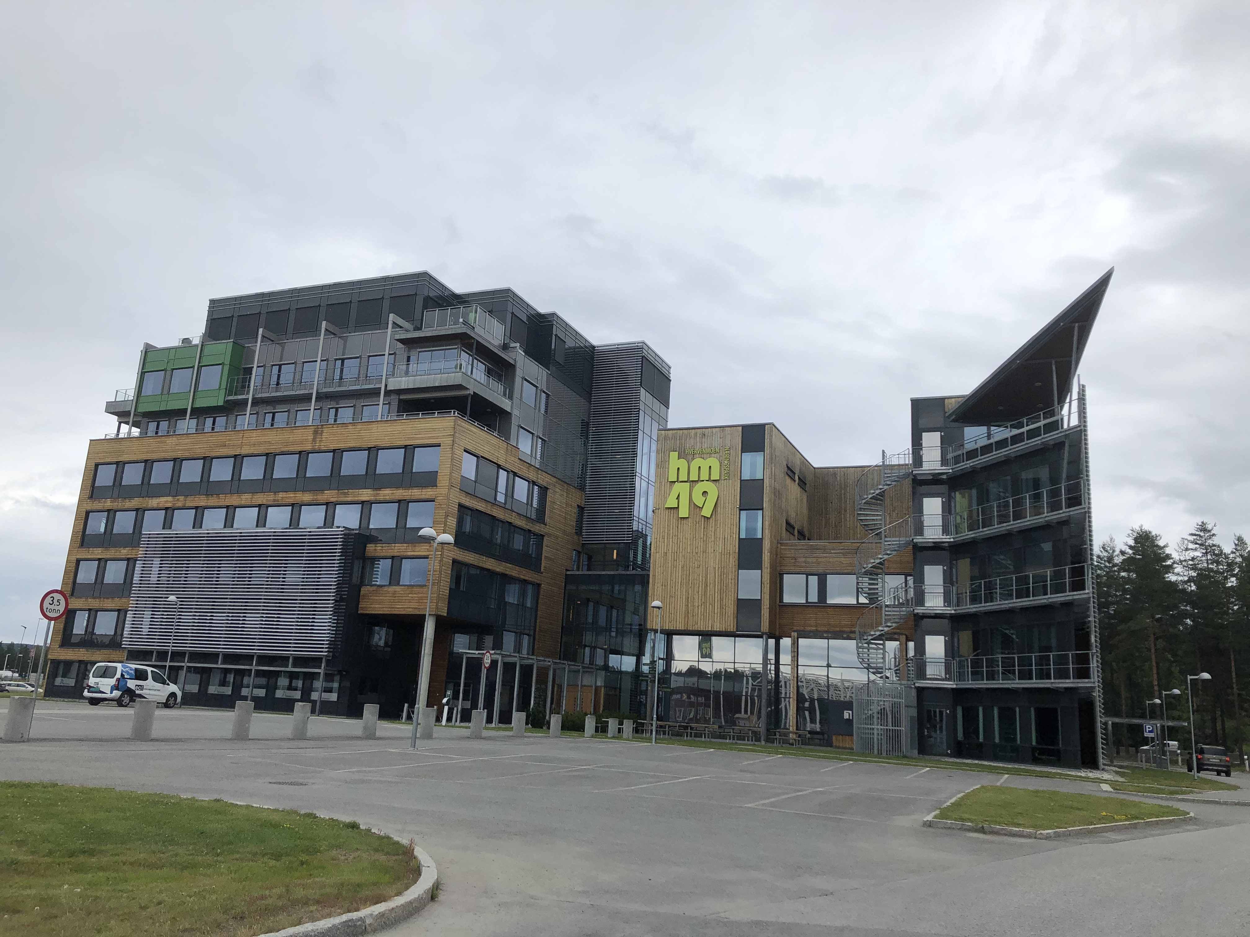 Hvervenmoveien 49, Hønefoss